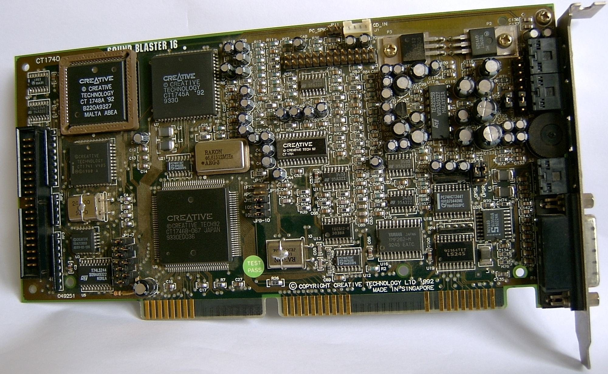 Soundblaster 16 (CT 1740) mit ASP